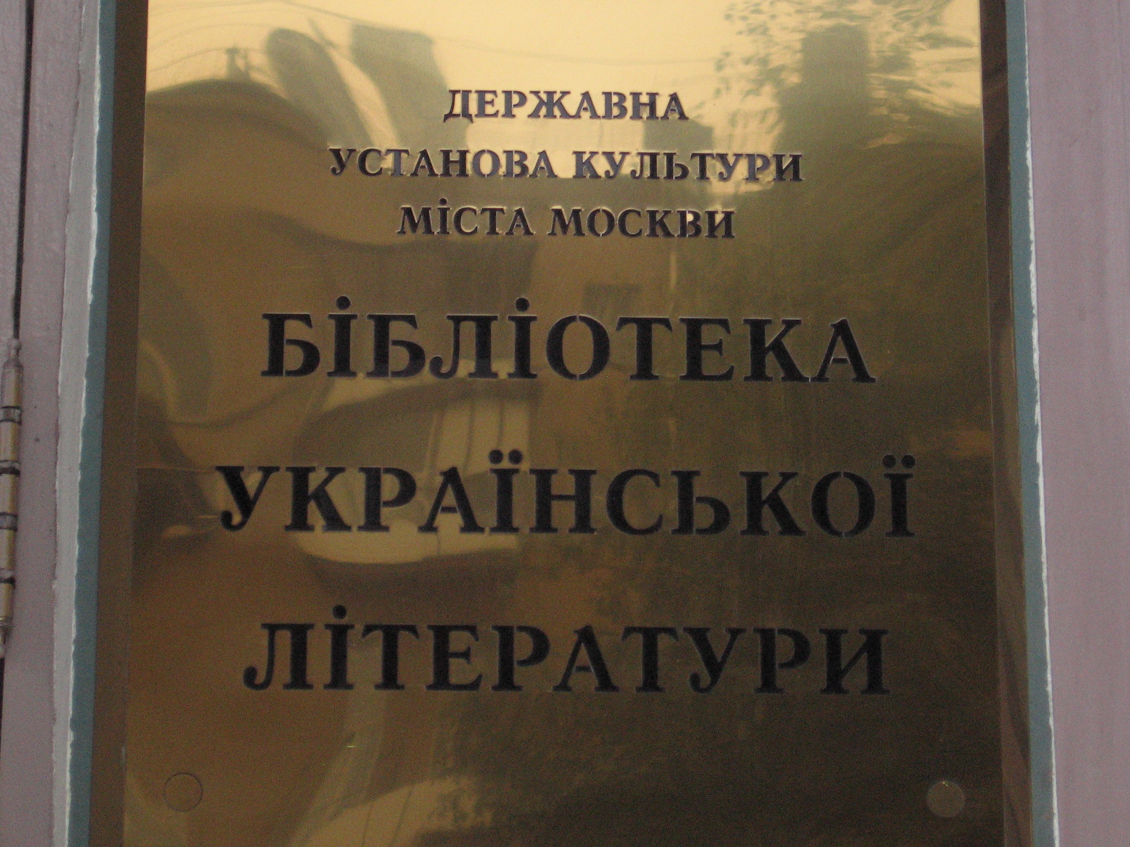 Вывеска Библиотеки украинской литературы в Москве на украинском языке